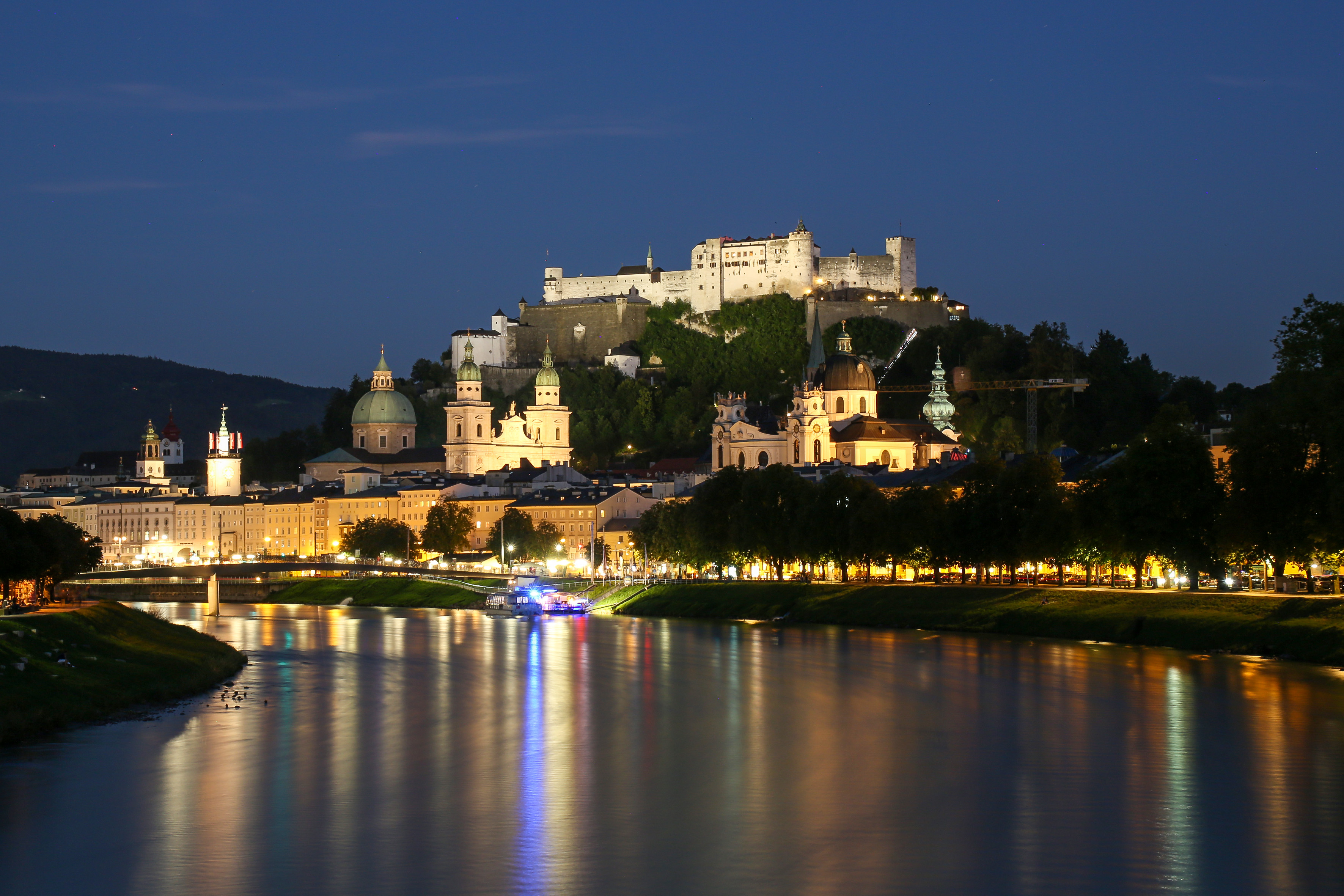 Festung Hohensalzburg Abendstimmung